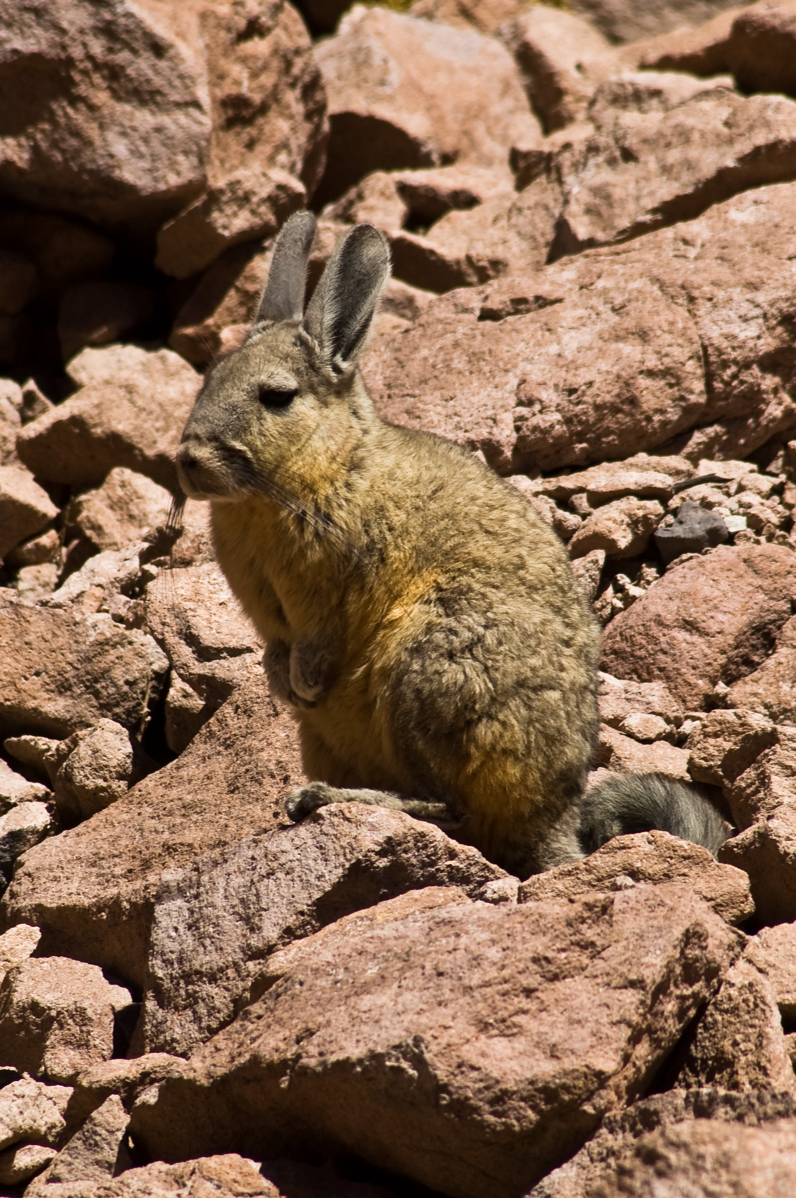 A vizcacha (Lagidium viscacia) near Rio Grande, in the Atacama desert, Chile.